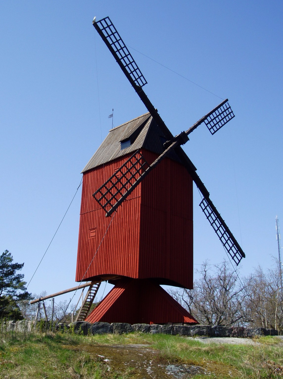 Väderkvarn på Furusund